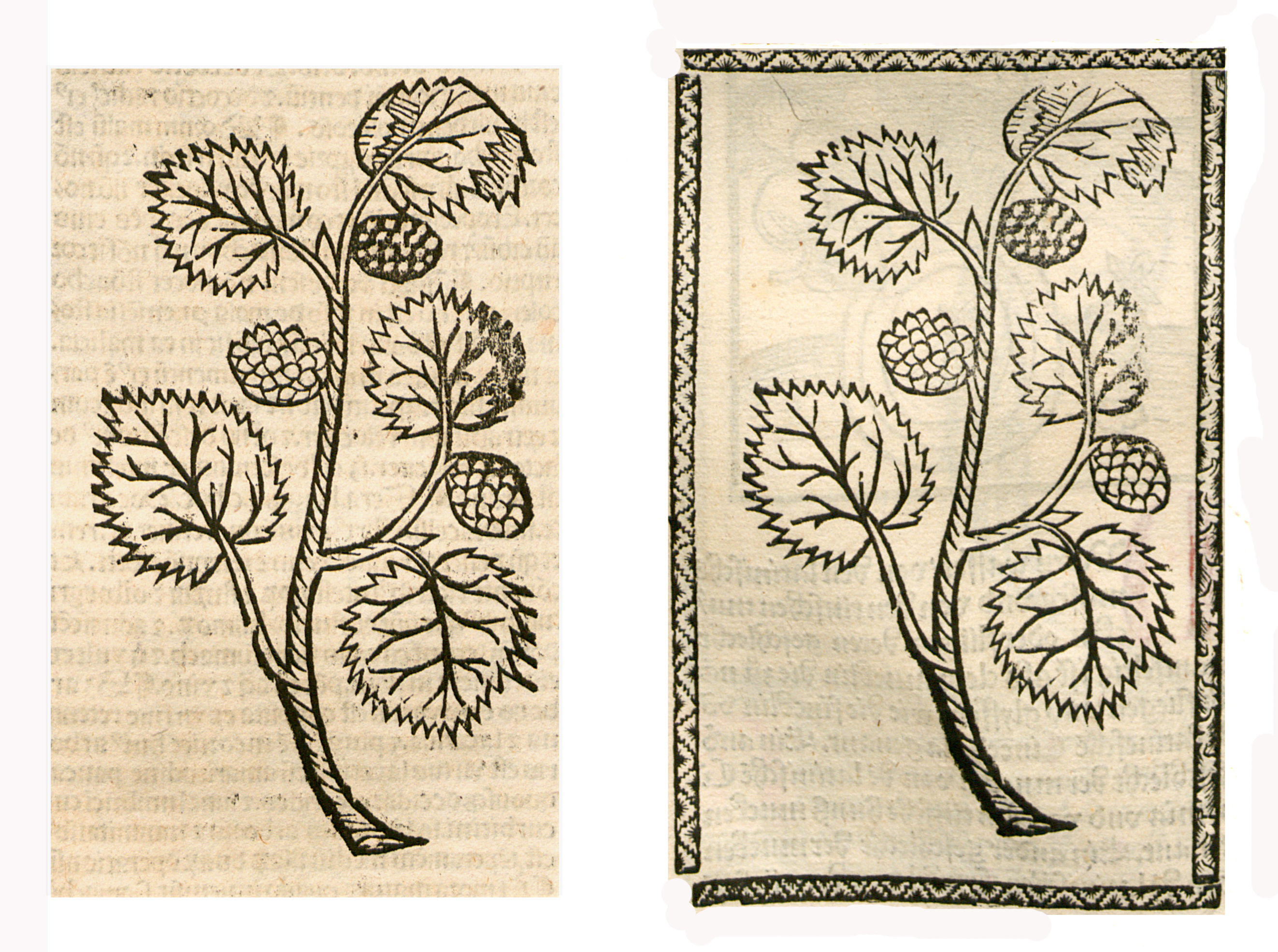 Abbildung von: Mulber (Morus spec.)